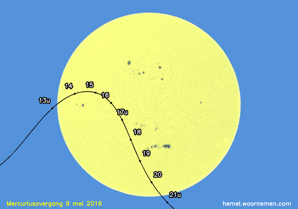 Kaart van de mercuriusovergang van 9 mei 2016 voor een waarnemer in Nederland of Belgie. De kaart is in horizontale coördinaten — het zenit is boven, waardoor het zonsbeeld draait gedurende de overgang. De positie van Mercurius is weergegeven voor ieder uur. Bron